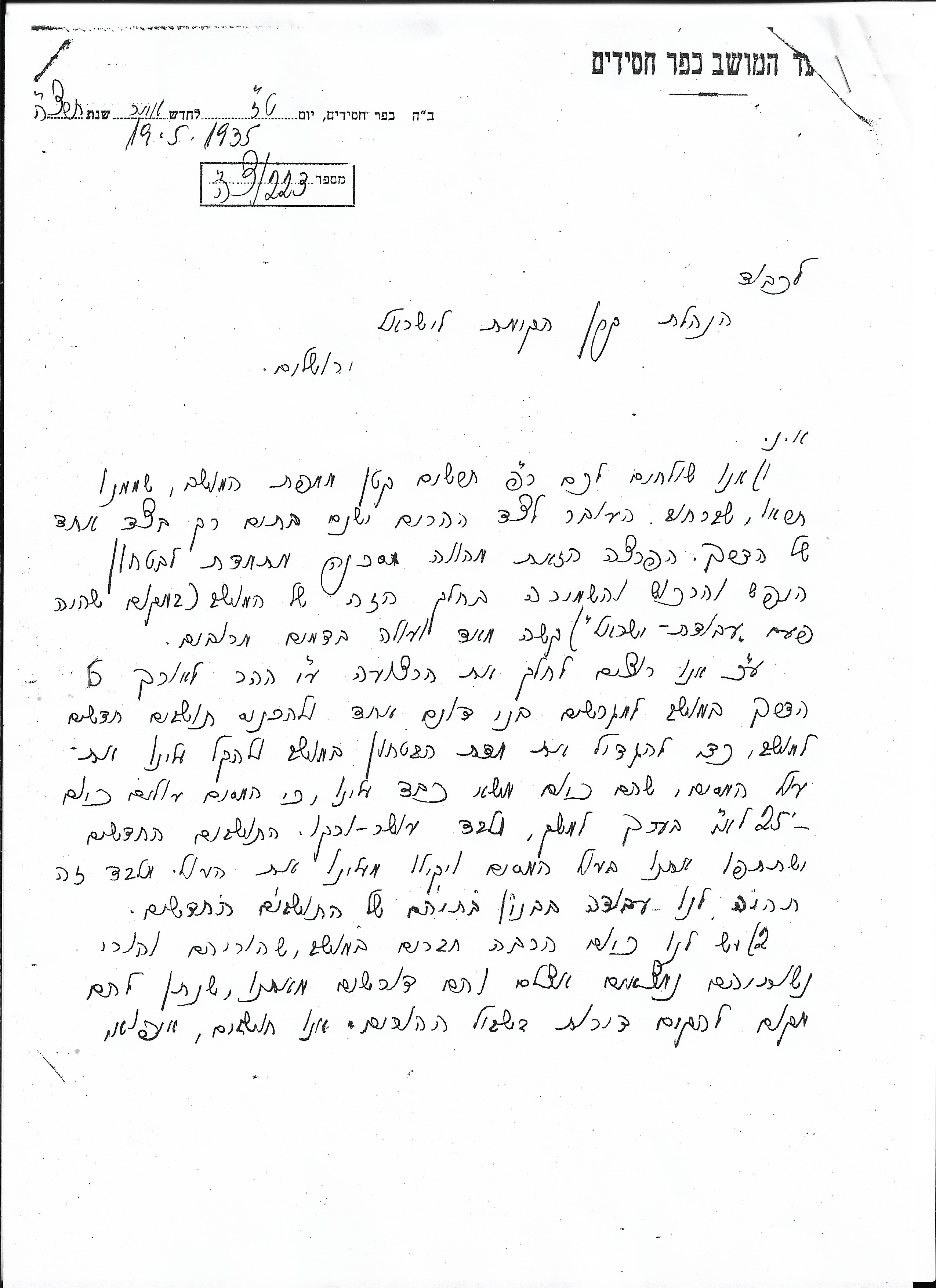 מכתב בקשה לקק"ל